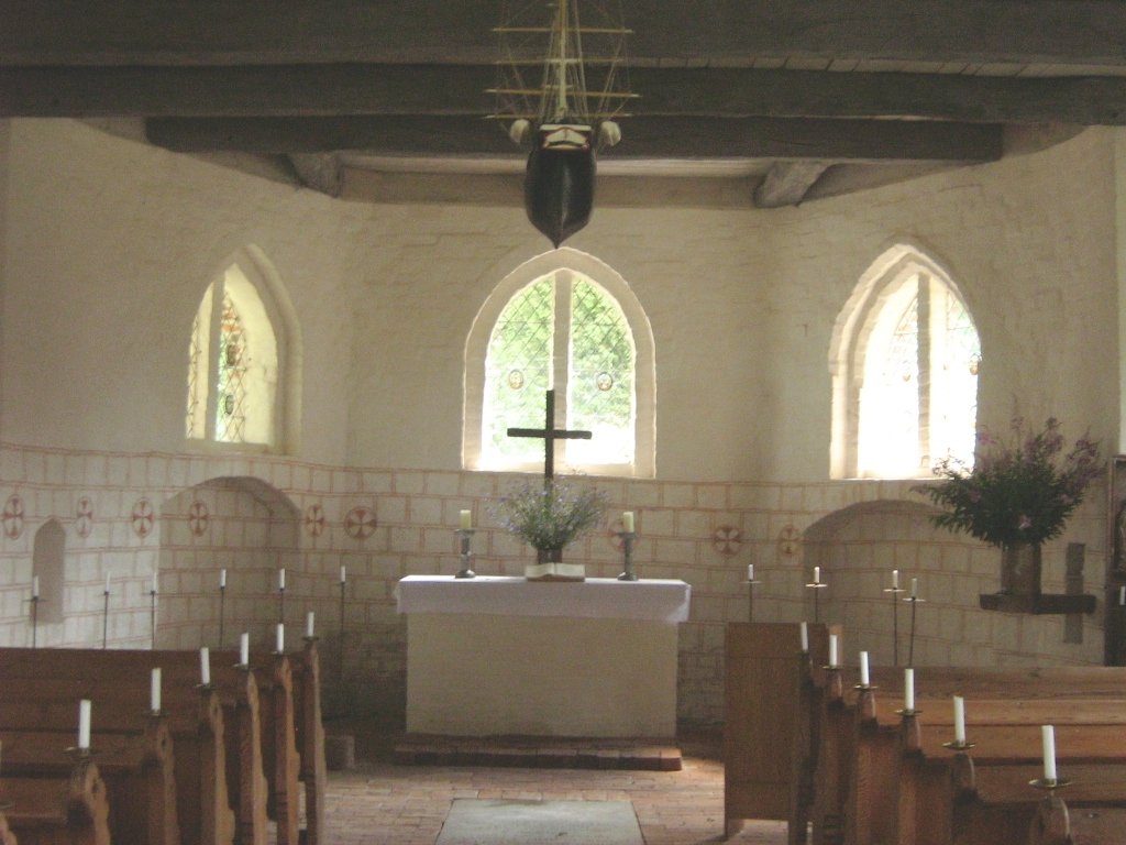 Kirche in Rostocker-Wulfshagen: Erbaut nach 1318. Der Außenbau ist ein Feld- und Backsteinbau mit polygonalem Ostabschluss, wohl 15. Jh., später mehrfach verändert. Beim Umbau 1825 unter Carl Theodor Severin wurden Turm und Sakristei abgetragen und der Westgiebel erneuert. Schmales Westportal mit klassizistischer Grabplatte. Der Innenraum ist flachgedeckt. Im Altarraum mittelalterliche Wandmalerei mit zwölf Weihekreuzen. Ausstattung: spätgotischer Schnitzaltar (um 1500) mit Kreuzigungsgruppe und Aposteln (unvollständig). Orgel von Chr. Börger, Rostock. Bankgestühl 2. Hälfte 19. Jh.. Votovschiff, Brigg von 1861, neun Kabinettscheiben mit Wappen (um 1645) die von der Wiederherstellung der Kirche nach dem 30-jährigen Krieg durch Rostocker Honoratioren zeugen, zehn Scheiben mit Bibelinschriften (1711). Grabstein J.Chr. Hennings (1804). Glocken: Zwei Glocken im freistehenden Glockenstuhl von O.G.Meyer 1737 und Rostock 1959.